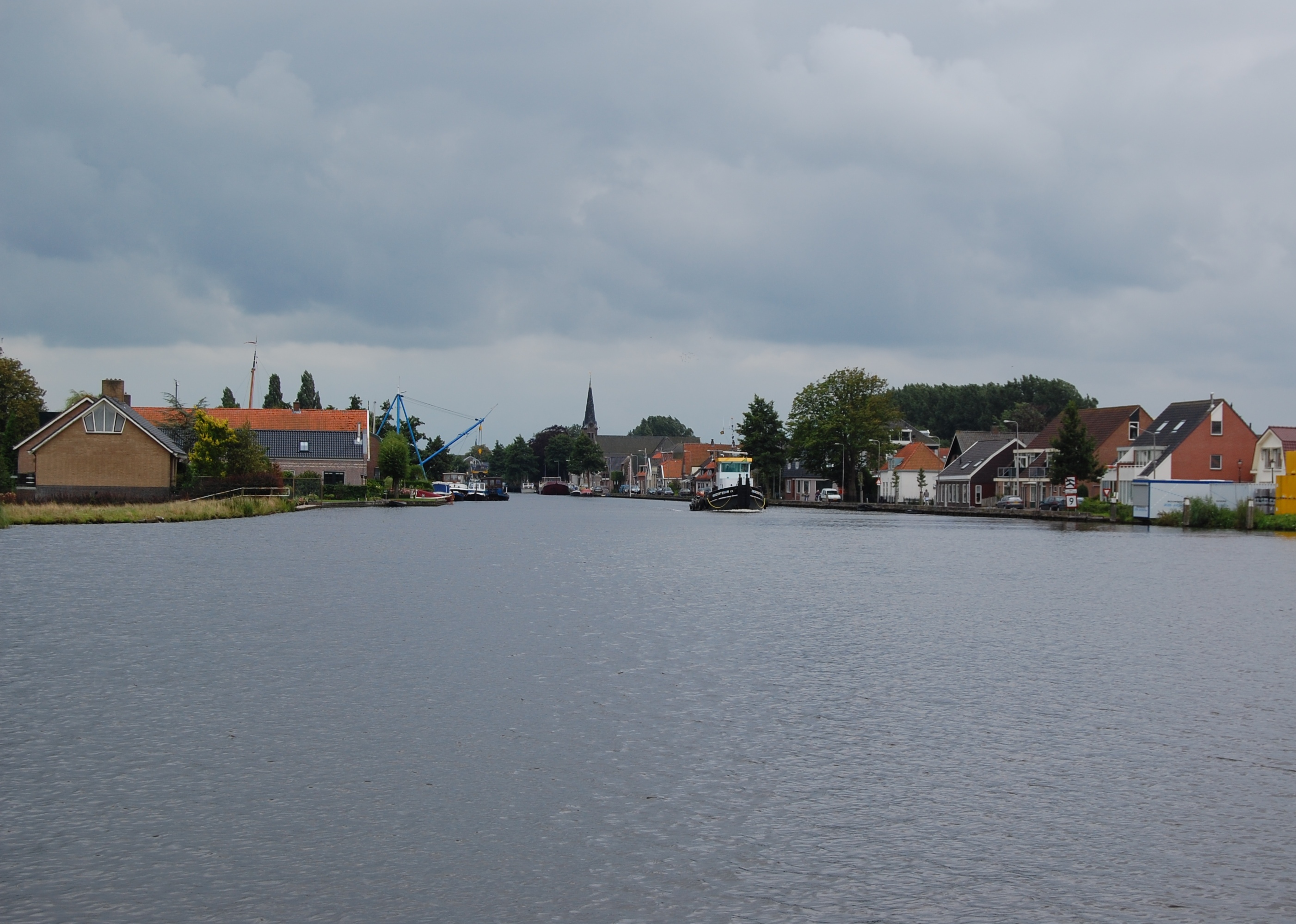 De kruising tussen de Ringvaart-Haarlemmermeer en de Oude-Wetering.